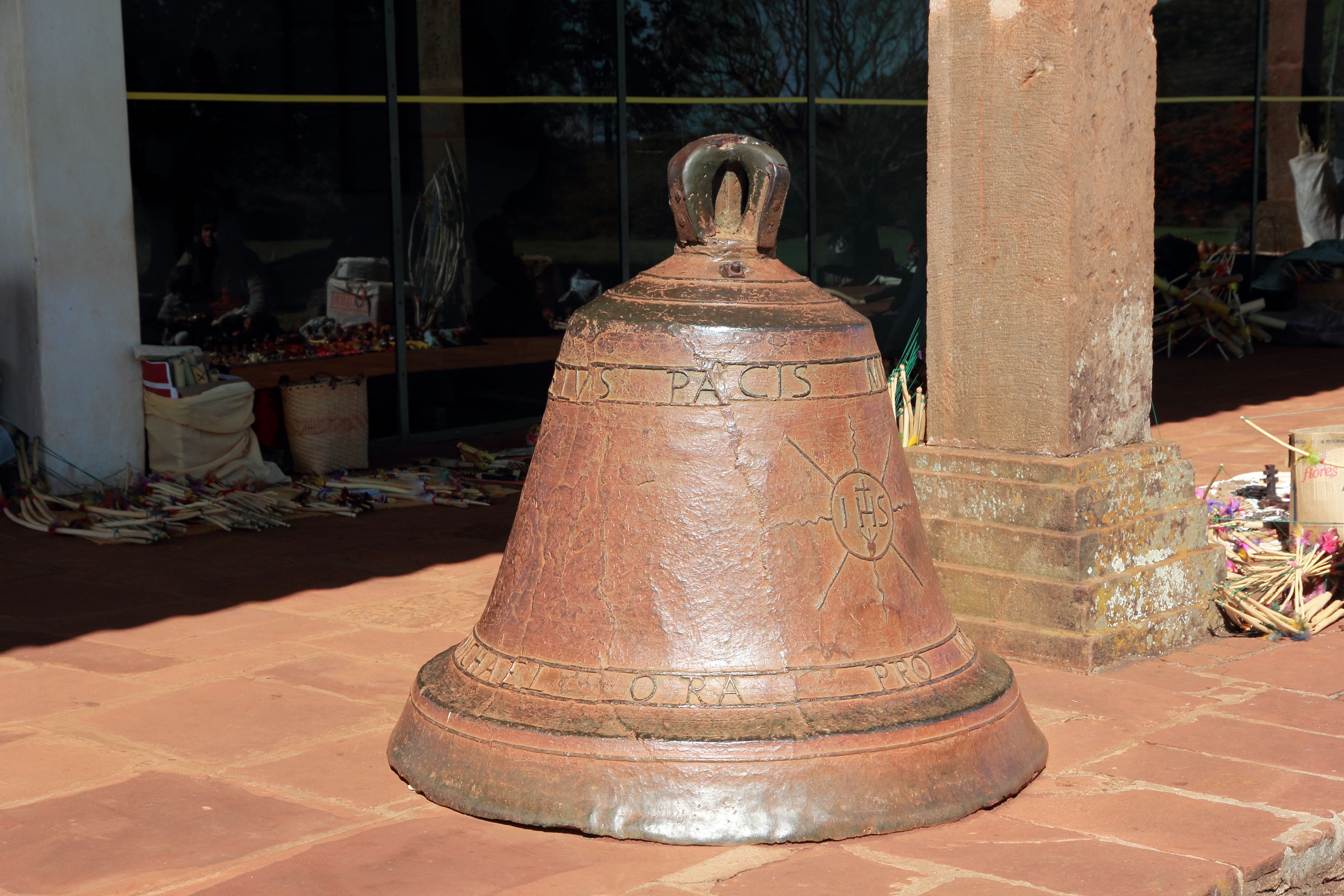 Sítio Arqueológico de São Miguel Arcanjo em São Miguel das Missões, RS.